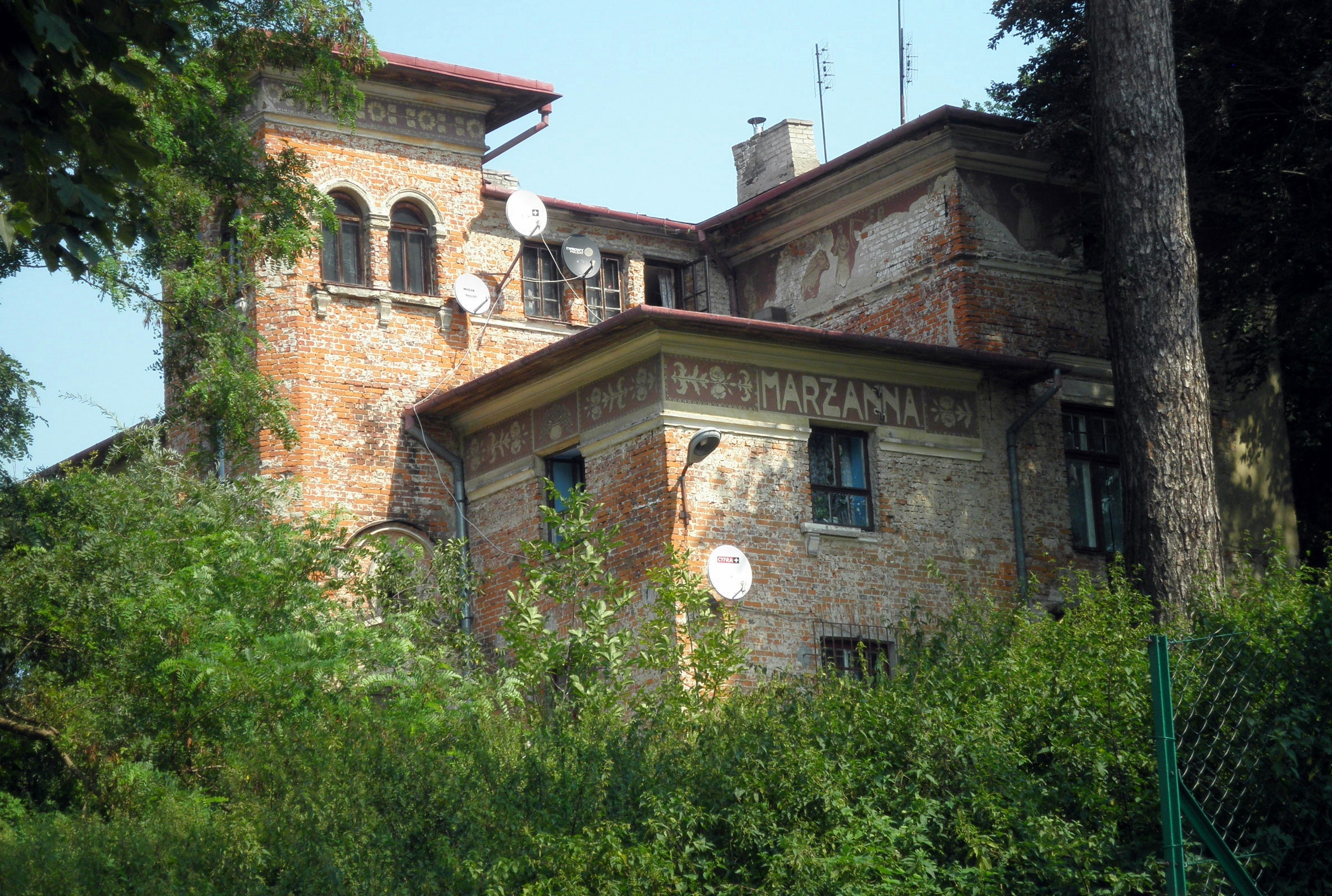 Willa "Marzanna" przy ul. Partyzantów 8 w Nałęczowie